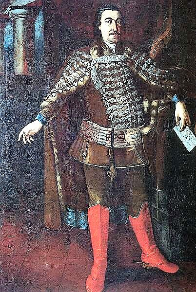 Haller János gubernátor